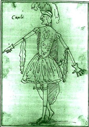 Antonio Maria Zanetti, caricatura del cantante d'opera Antonio Francesco Carli.